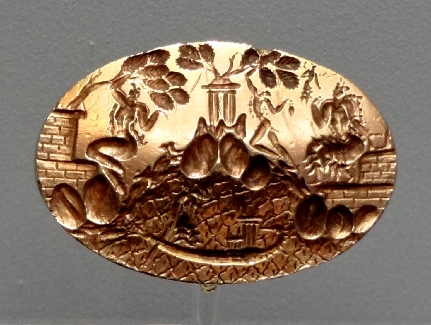 Sogenannter Ring des Minos (1450–1400 v. Chr.) aus Knossos, ausgestellt im Archäologischen Museum Iraklio, Kreta, Griechenland